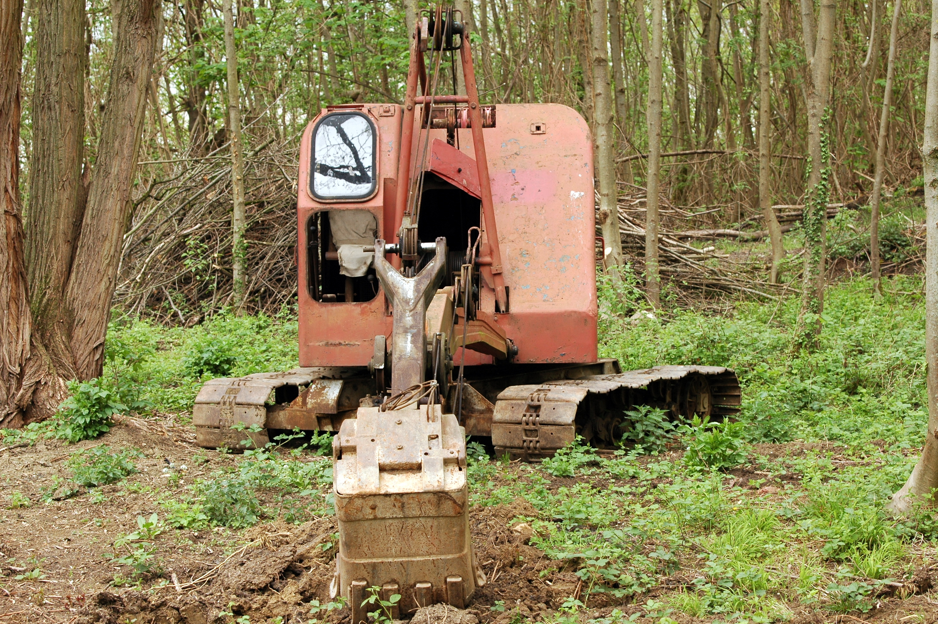 Feldbahn- & Industriemuseum Wiesloch